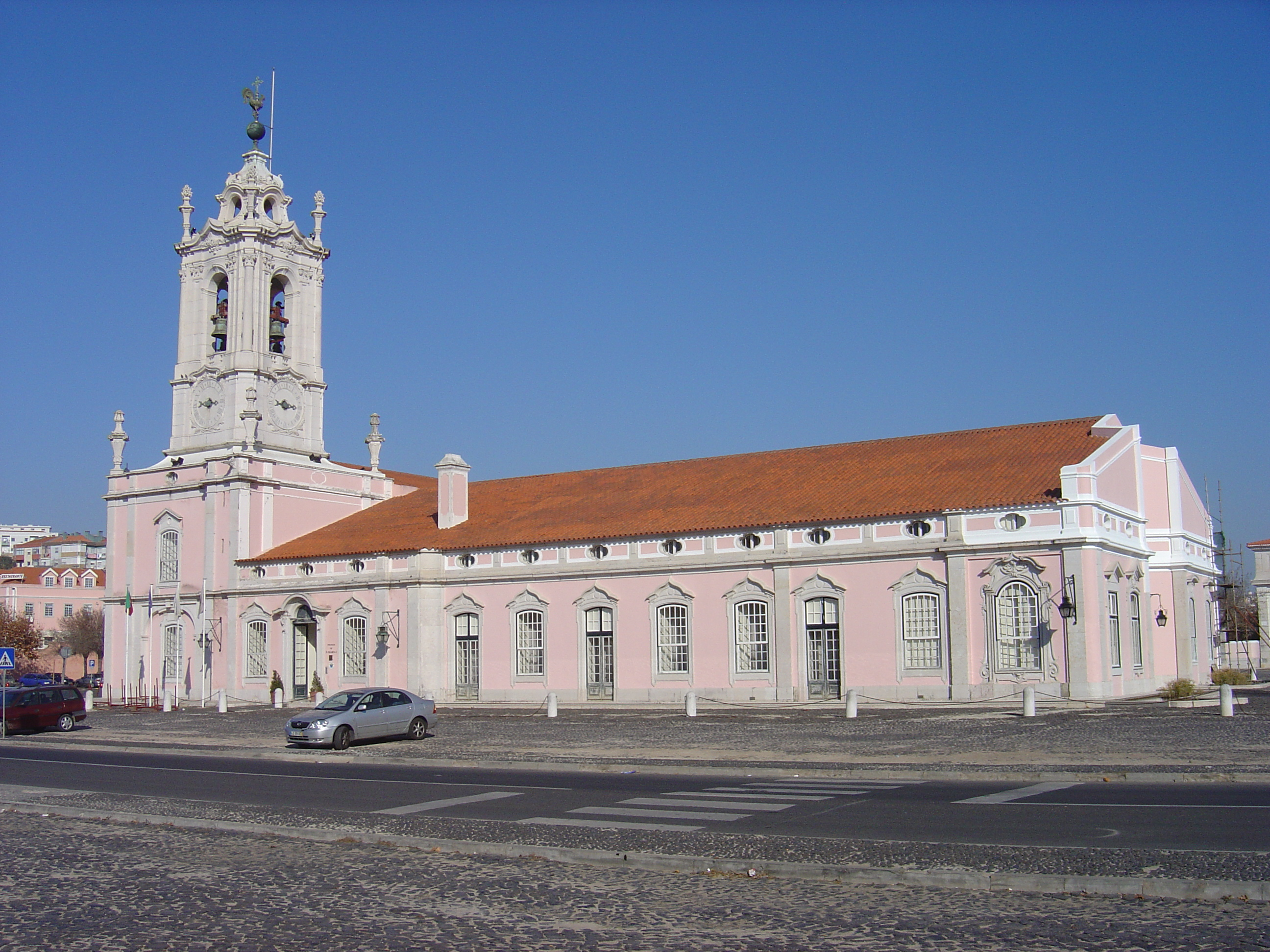 Queluz National Palace, Portugal